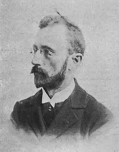 Jan Drozdowski pianista (-1905)